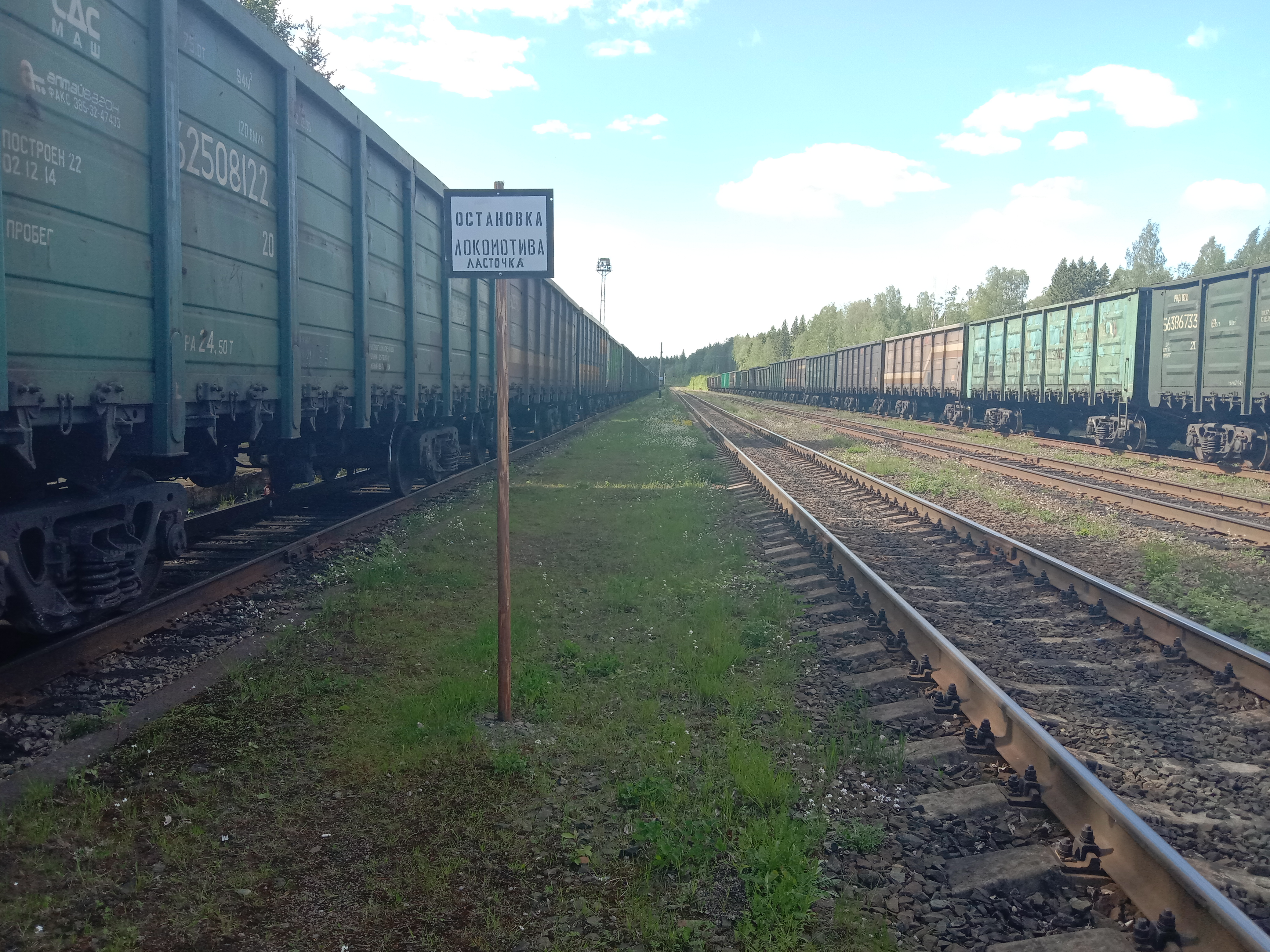 Янисъярви